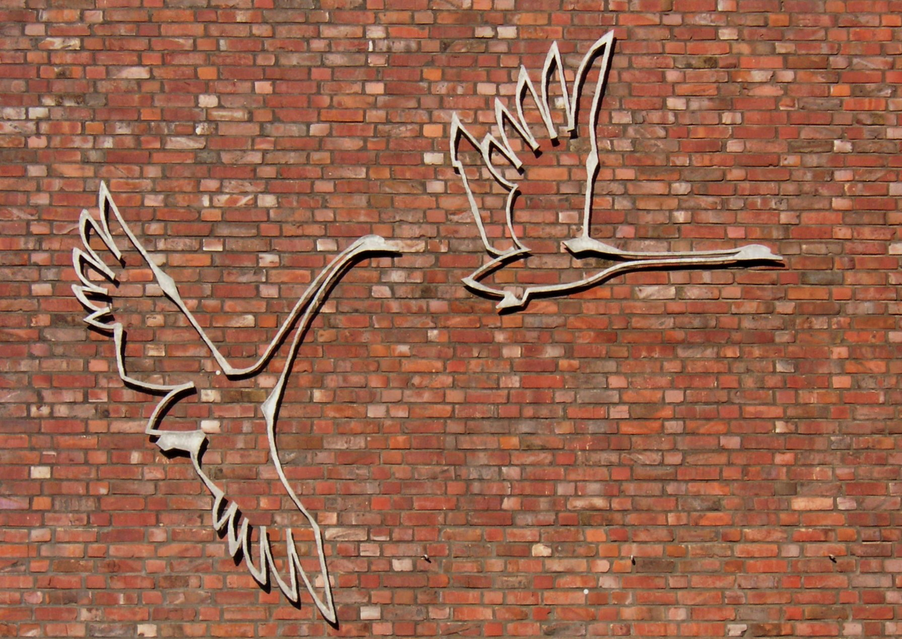 Die fliegenden Schwäne des Künstlers Kurt Bauer am Matthias Claudius Gymnasium in Hamburg